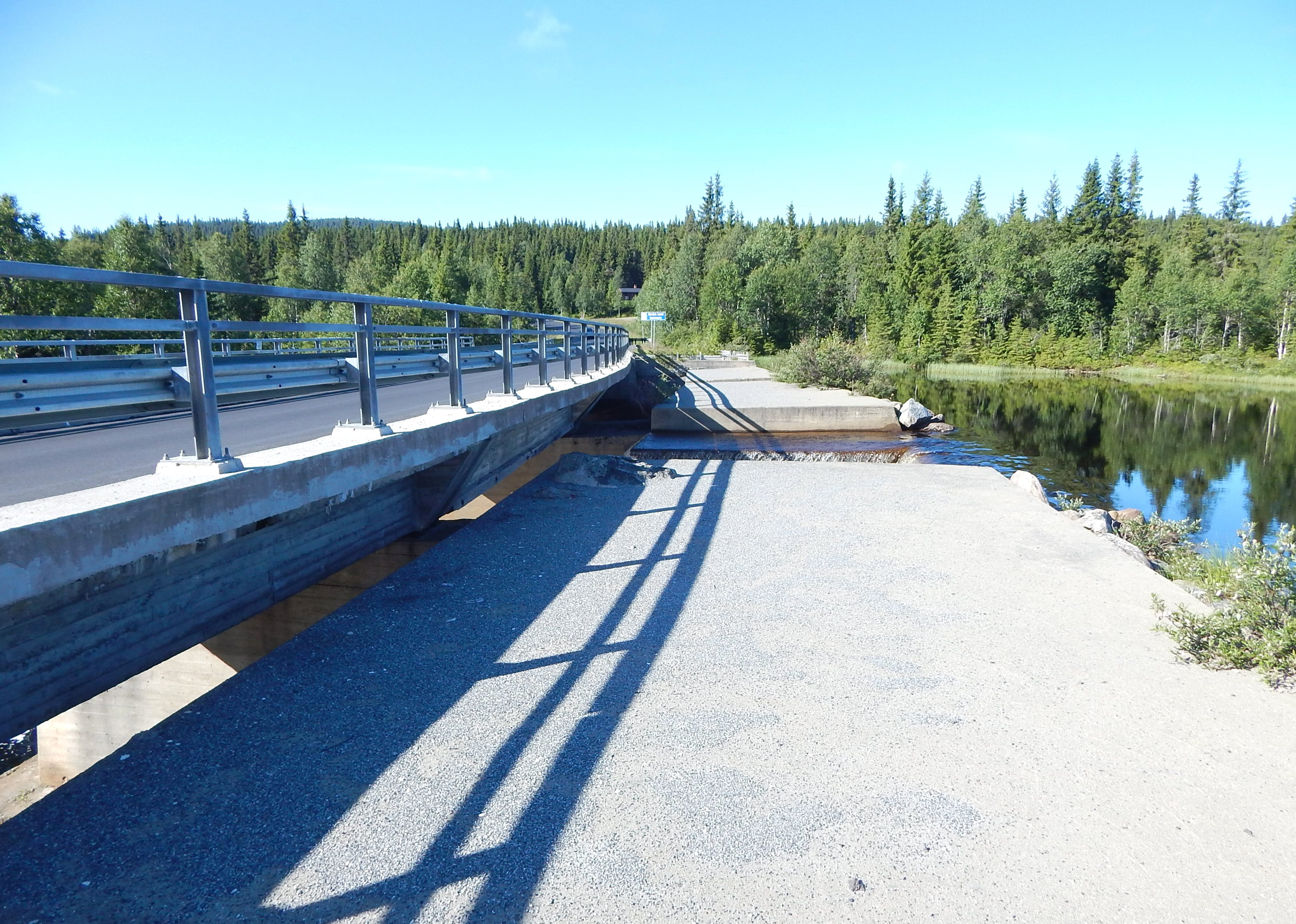 Storlondammen